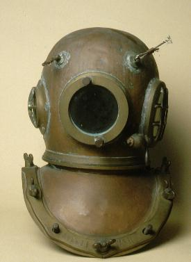 Elmo da palombaro realizzato in lamiera di rame. L'elmo presenta una finestra anteriore di forma circolare in vetro e due finestre laterali, protette da una griglia; la finestra sinistra ha una forma ellittica, mentre quella di destra, di superficie minore, è di forma circolare. Le due finestre laterali sono fisse, mentre quella anteriore è fissata mediante due viti. L'elmo è equipaggiato con l'attacco per il cavo telefonico sul fianco destro, con la manichetta per la fornitura dell'aria al palombaro sul retro e con la valvola di scarico alla sinistra della finestra frontale. L'elmo inoltre è provvisto di collare, anch'esso in lamiera di rame, dotato di viti a galletto per l'attacco alla muta. Notizie storico-critiche L'invenzione dell'elmo da palombaro risale al 1828 sviluppato dai fratelli inglesi Charles e John Dean a partire dalle campane che si utilizzavano nei secoli precedenti per le immersioni, mentre nel 1837 si affermò lo scafandro realizzato da Augustus Siebe. Nel corso degli anni, l'equipaggiamento dei palombari non ebbe sostanziali modificazioni, ma progressivi miglioramenti dovuti al progresso della tecnologia. L'elmo rappresenta l'unica parte rigida dello scafandro, completato da un vestito di tela gommata e da scarponi zavorrati con piombo; al di sotto della muta gommata, il palombaro doveva indossare indumenti di lana per la protezione dalle basse temperature. Questi elmi erano dotati di un rubinetto per lo scarico dell'aria ell'esterno e di una manichetta per l'aria, collegata medianti tubi ad una pompa a mano, azionata da due uomini.